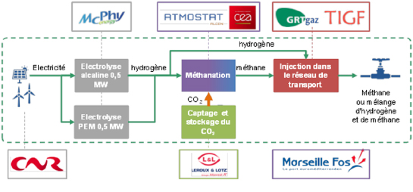 Schéma de la production de Power-to-Gas du démonstrateur Jupiter 1000